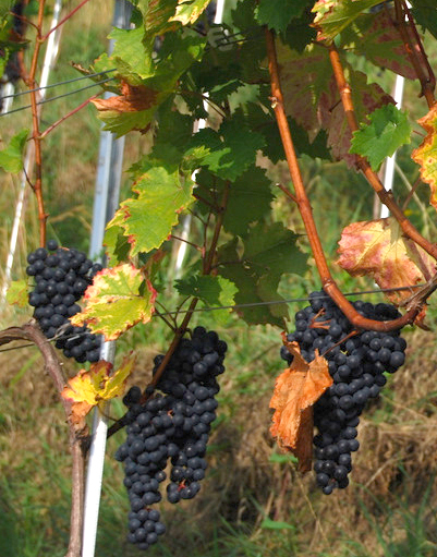 Blätter und reife Traube der roten Rebsorte Cabernet Jura